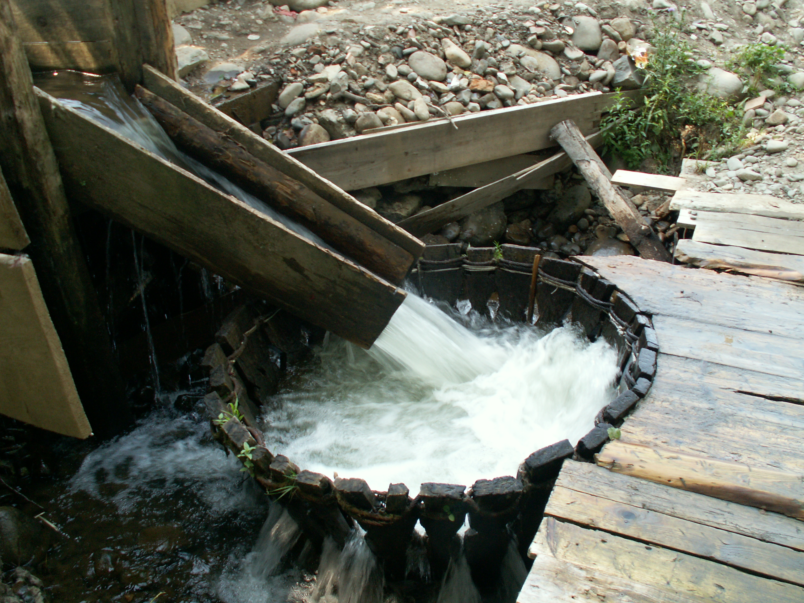 Ansamblul de arhitectură tehnică populara Complex vâltori sat Săpânţa judeţul Maramureş